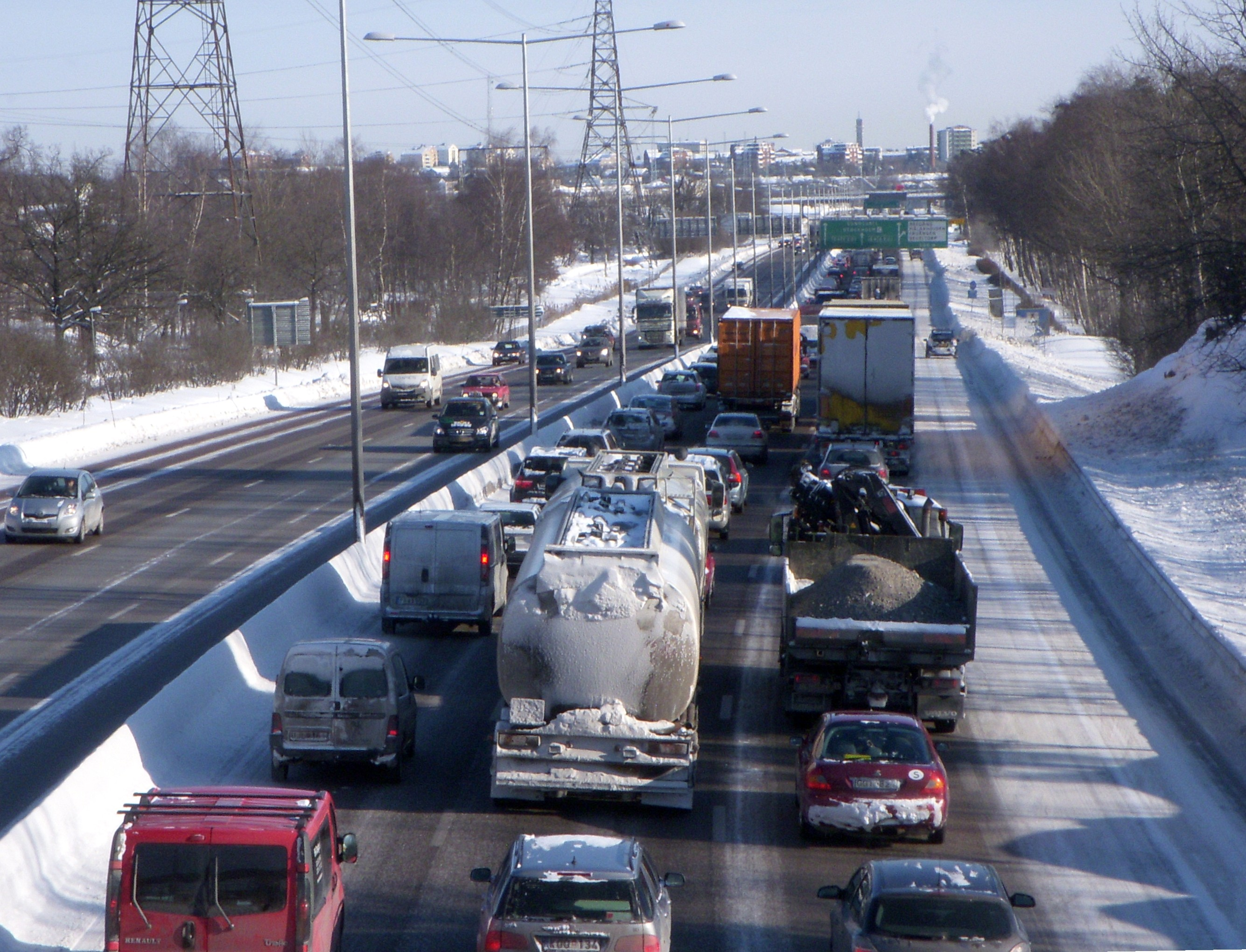 Södertäljevägen mot norr före Bredängsmotet